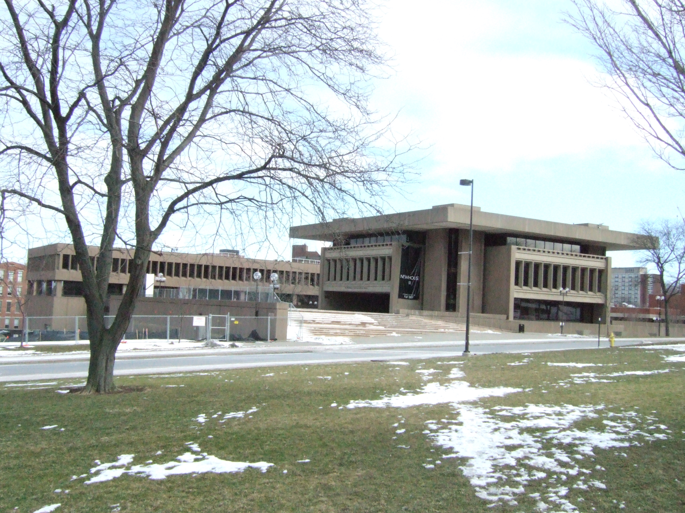 03/07/06 taken by Kisstory